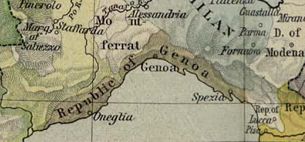 Genua 1477